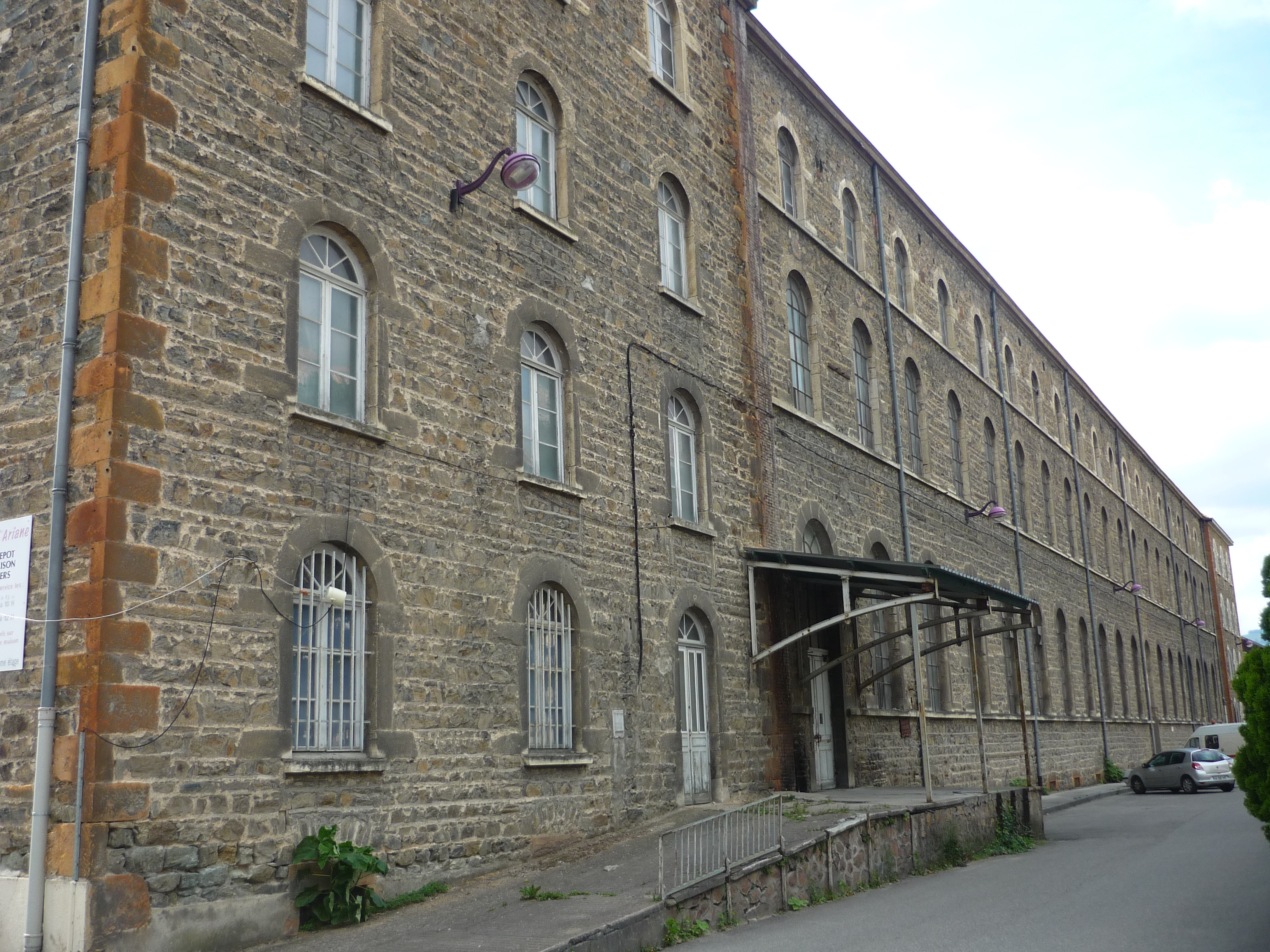 Ancienne manufacture de moulinage J.-B. Martin à Tarare, dans le département du Rhône. Cette usine aujourd'hui désaffectée est inscrite au titre de monument historique depuis 1987. Des logements utilisent une partie du bâtiment. .